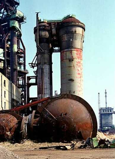 Abriss der ehemaligen Krupp-Hüttenwerke in Rheinhausen, heute Stadtbezirk von Duisburg.